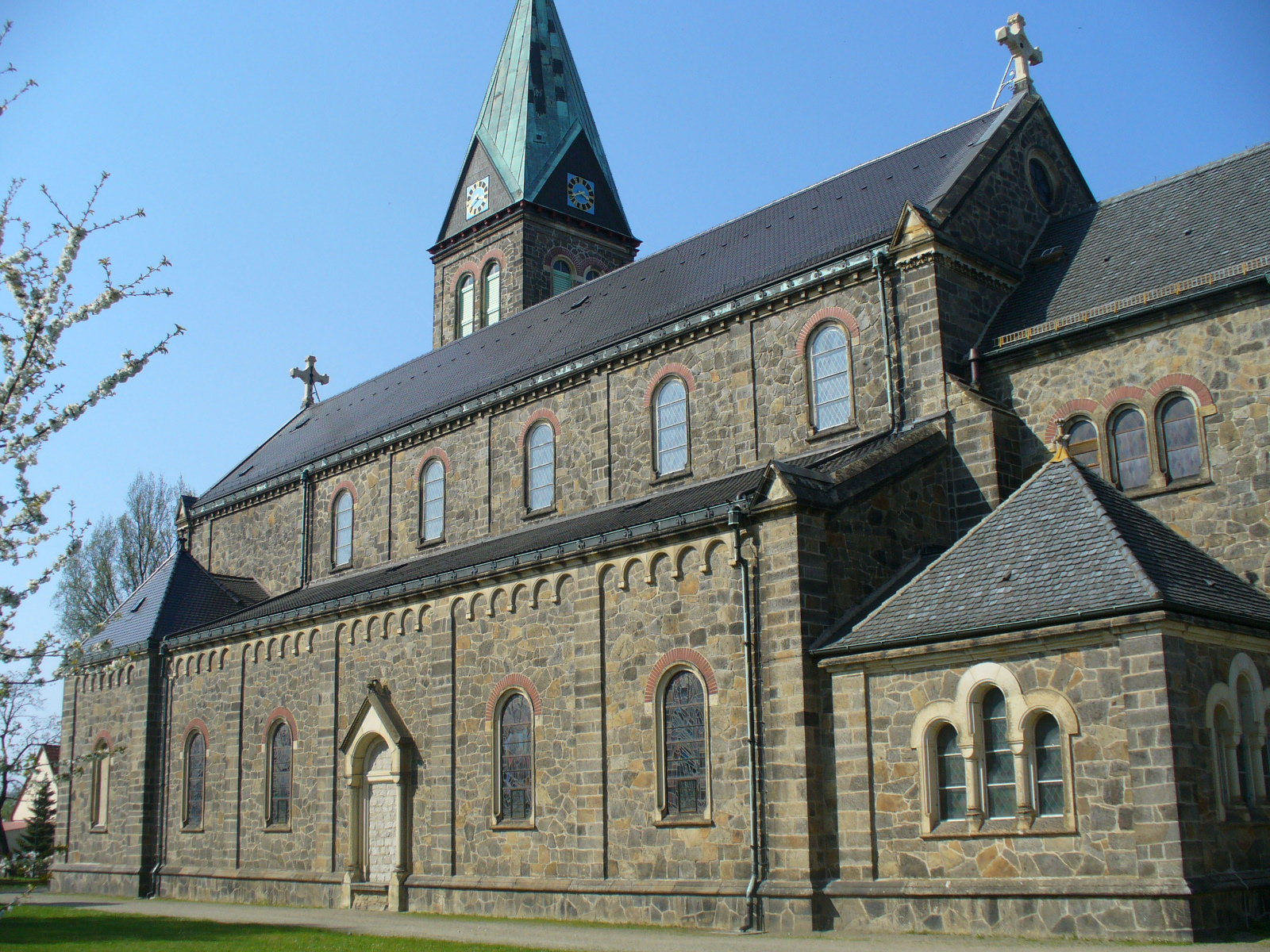 Radibor, Kirche Hornjoserbsce: Cyrkej swj. Marije, kralowny swjateho róžowca w Radworju